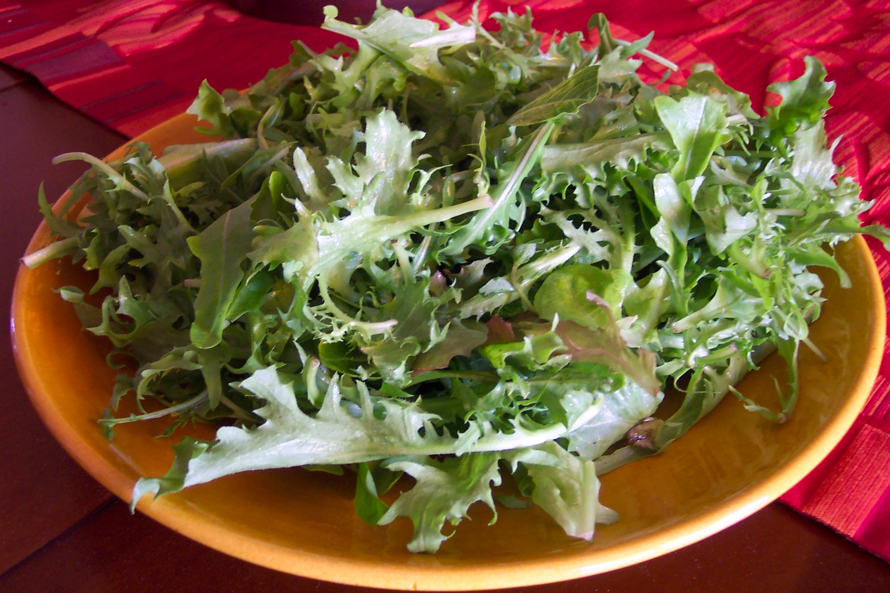 Nice-Cuisine Le mesclun